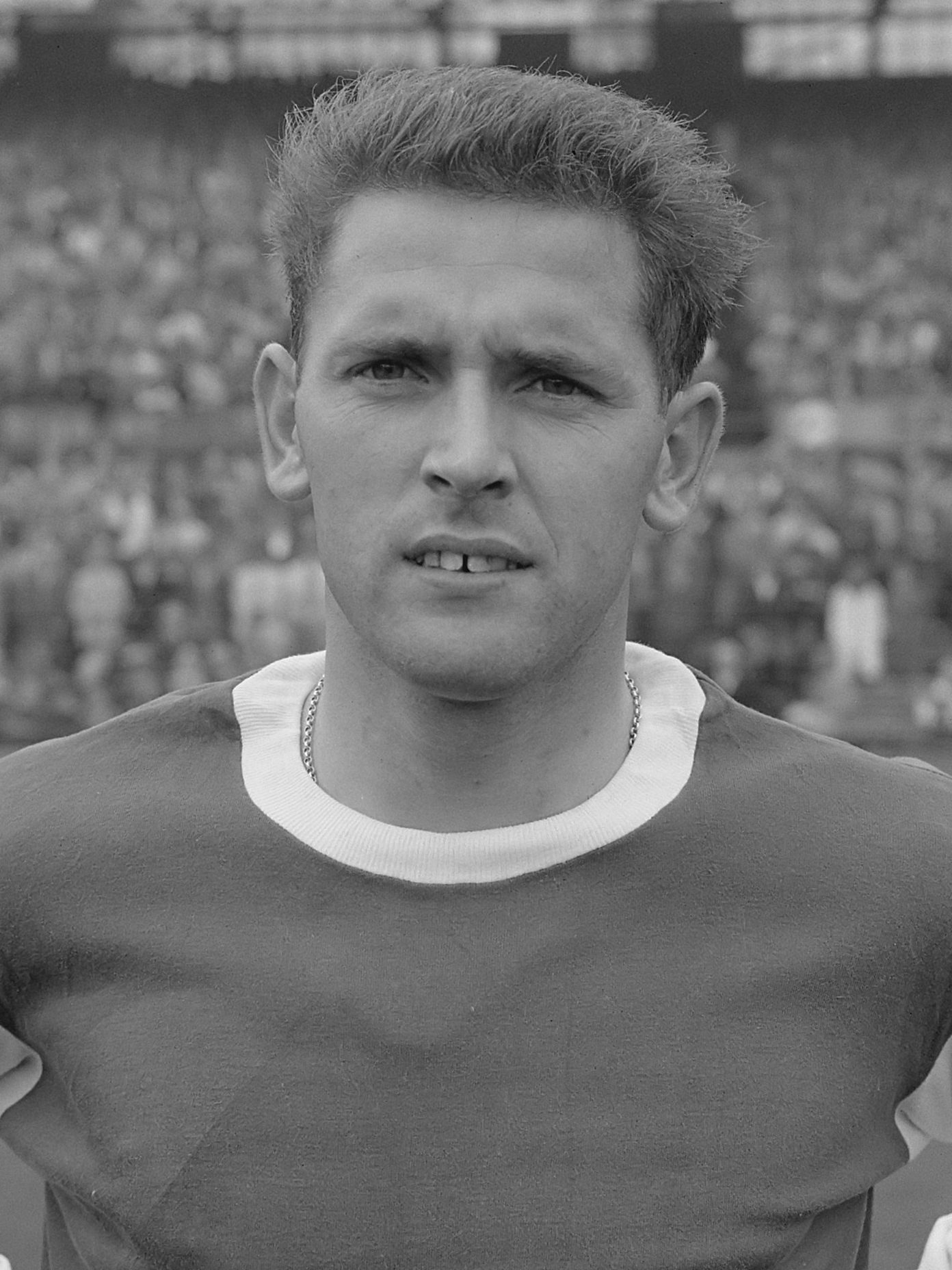 Feyenoord tegen PSV, Weering (Feyenoord) kop 22 augustus 1965